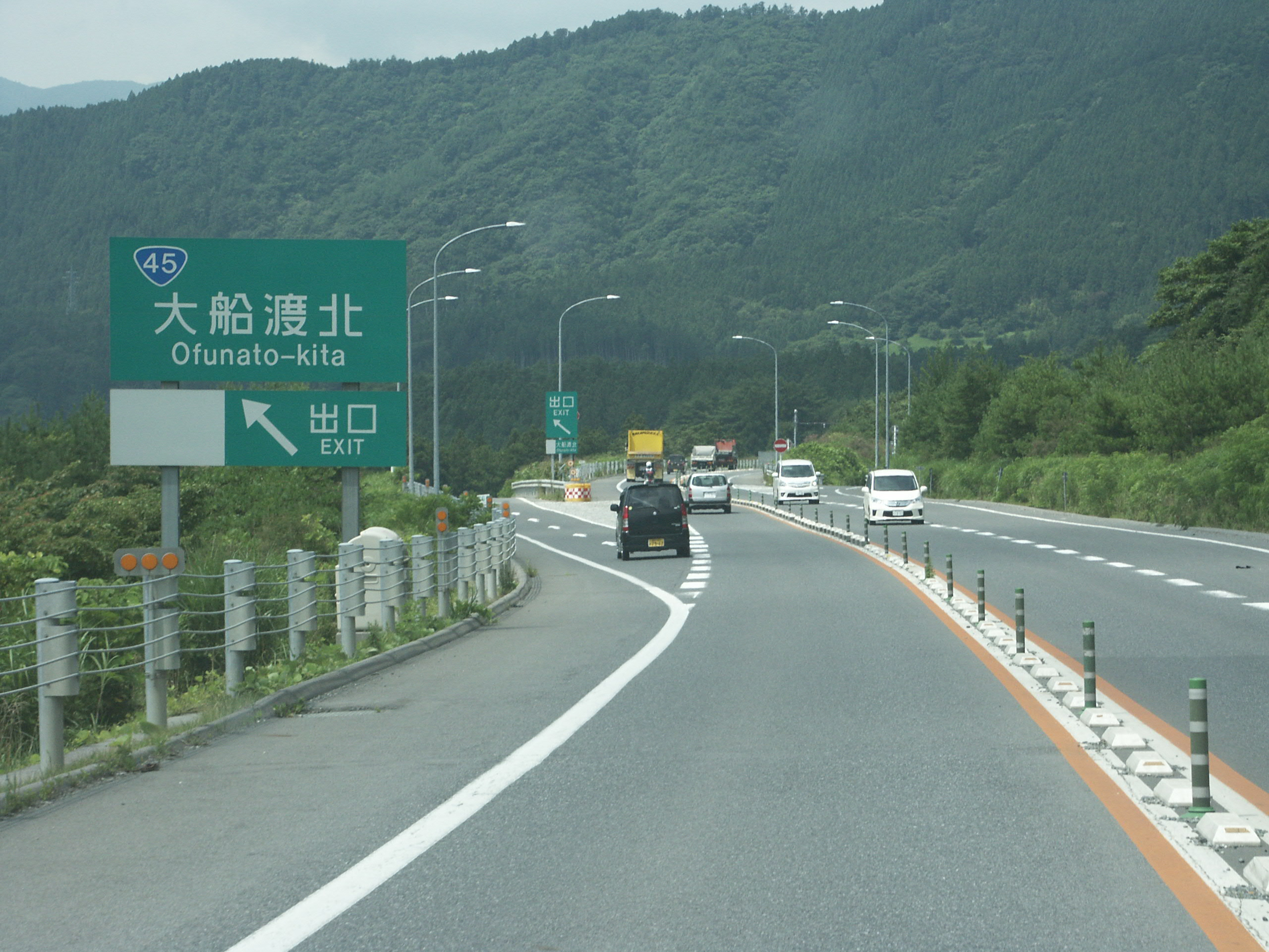 三陸自動車道（大船渡三陸道路）大船渡北IC出口（三陸IC方面側）